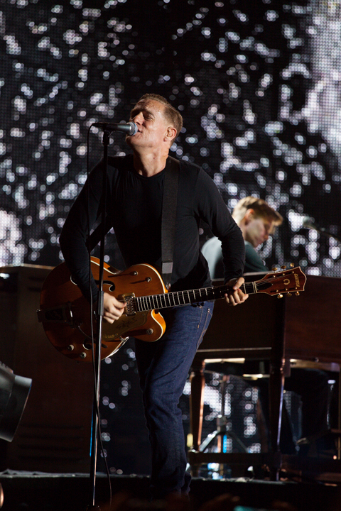 20130710-ByanAdamsLucca-0094